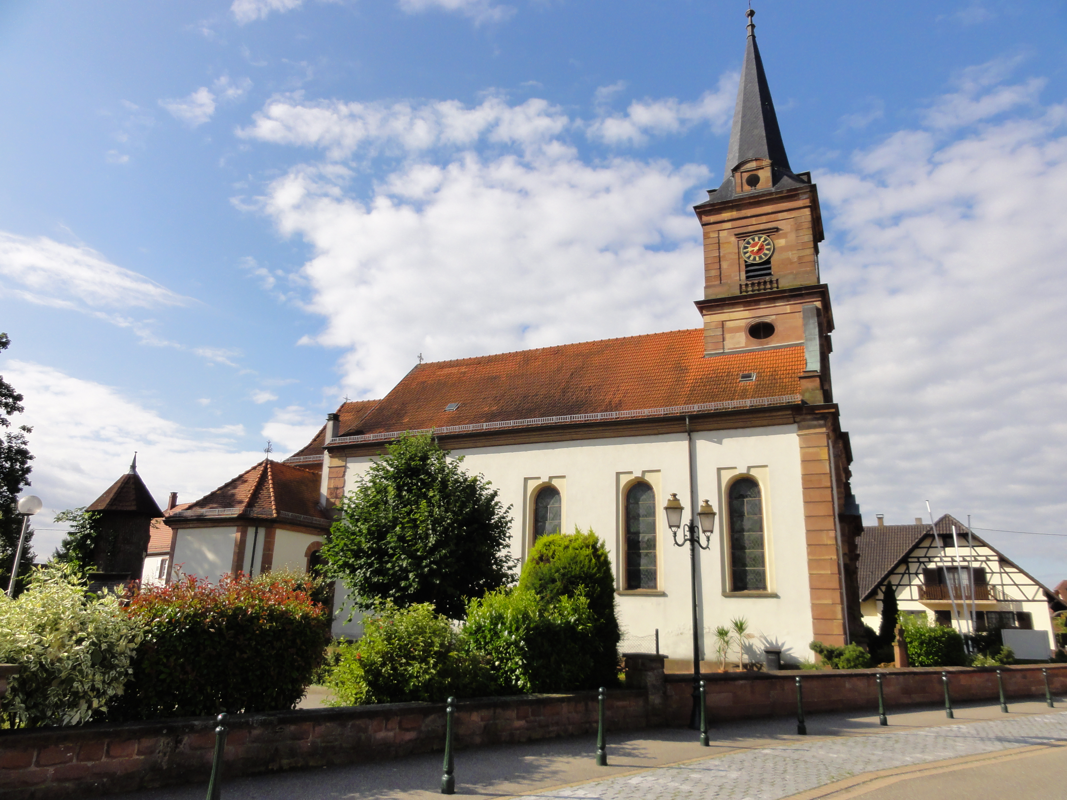 Alsace, Bas-Rhin, Rountzenheim, Église simultanée Sainte-Croix (PA00084919, IA00124039).